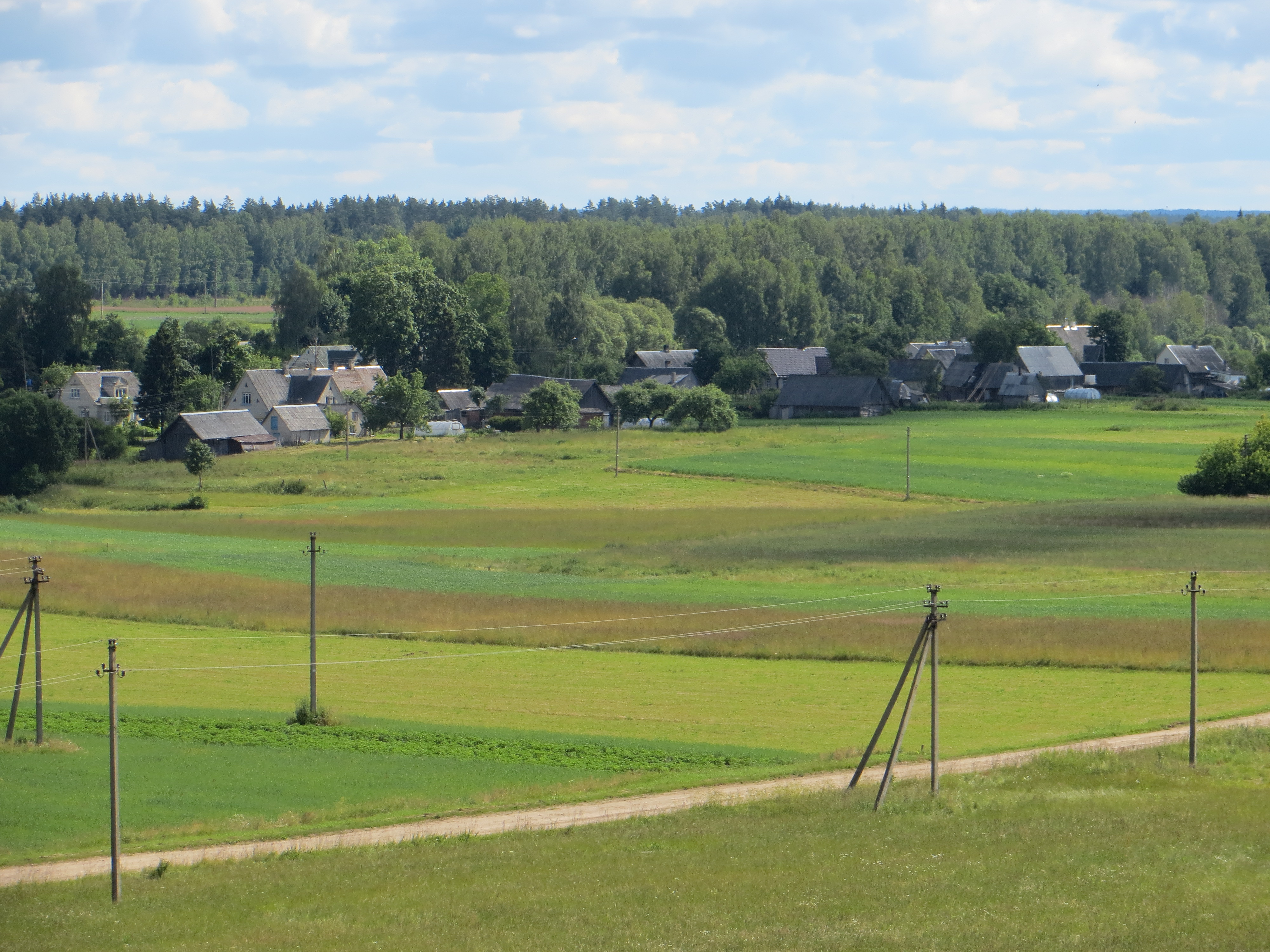 Pabradės sen., Lithuania